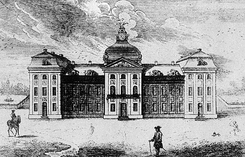 Pałac Kazimierzowski